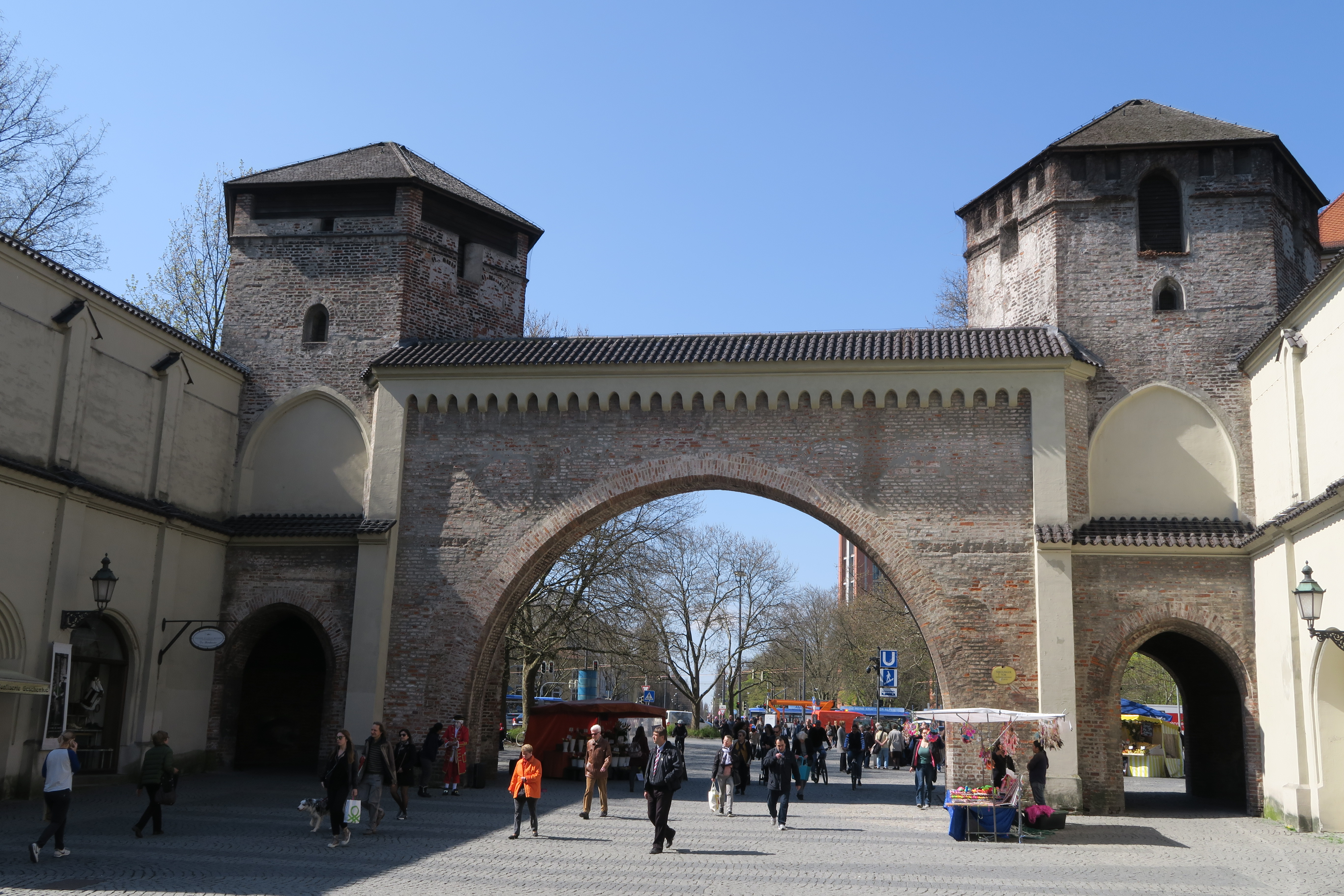 Sendlinger Tor, aufgenommen von der Sendlingerstraße aus